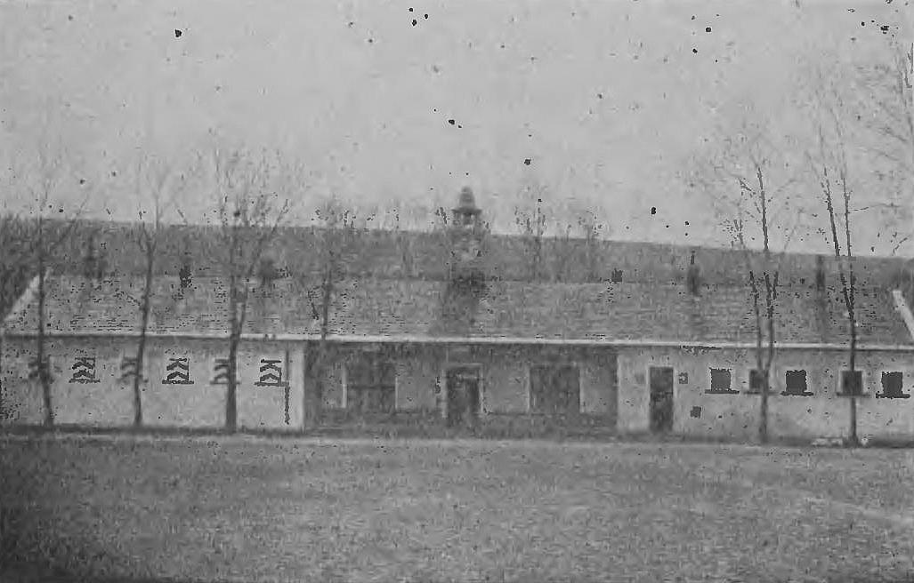 Koszary i stajnie 10 pułku art. ciężkiej (-1933)